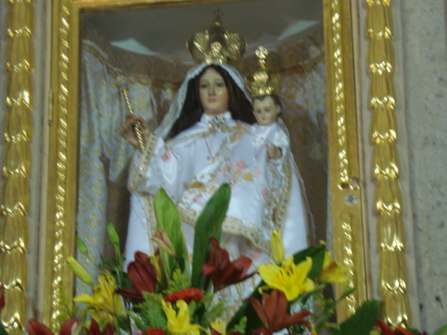 Patrona del pueblo de Toluquilla, Tlaquepaque